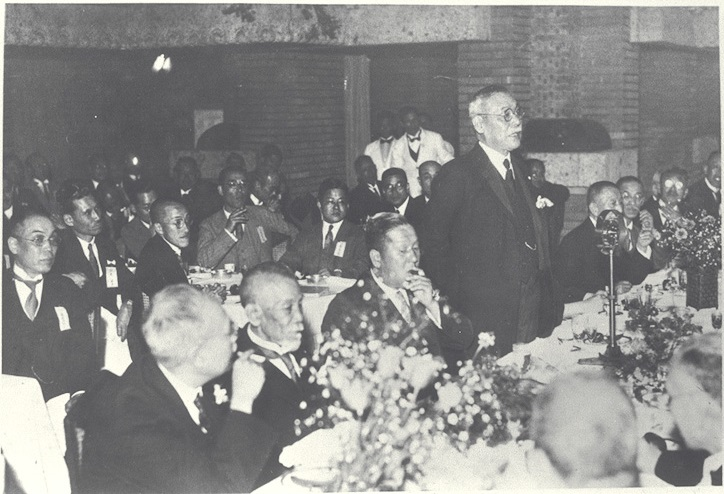 昭和7年(1932年)5月9日午後6時から、帝国ホテル宴会場において連合三田会開催。出席者は総理大臣犬養毅ほか約800名に達した。写真右から鎌田栄吉、左へ朝吹常吉、犬養毅、武藤山治。